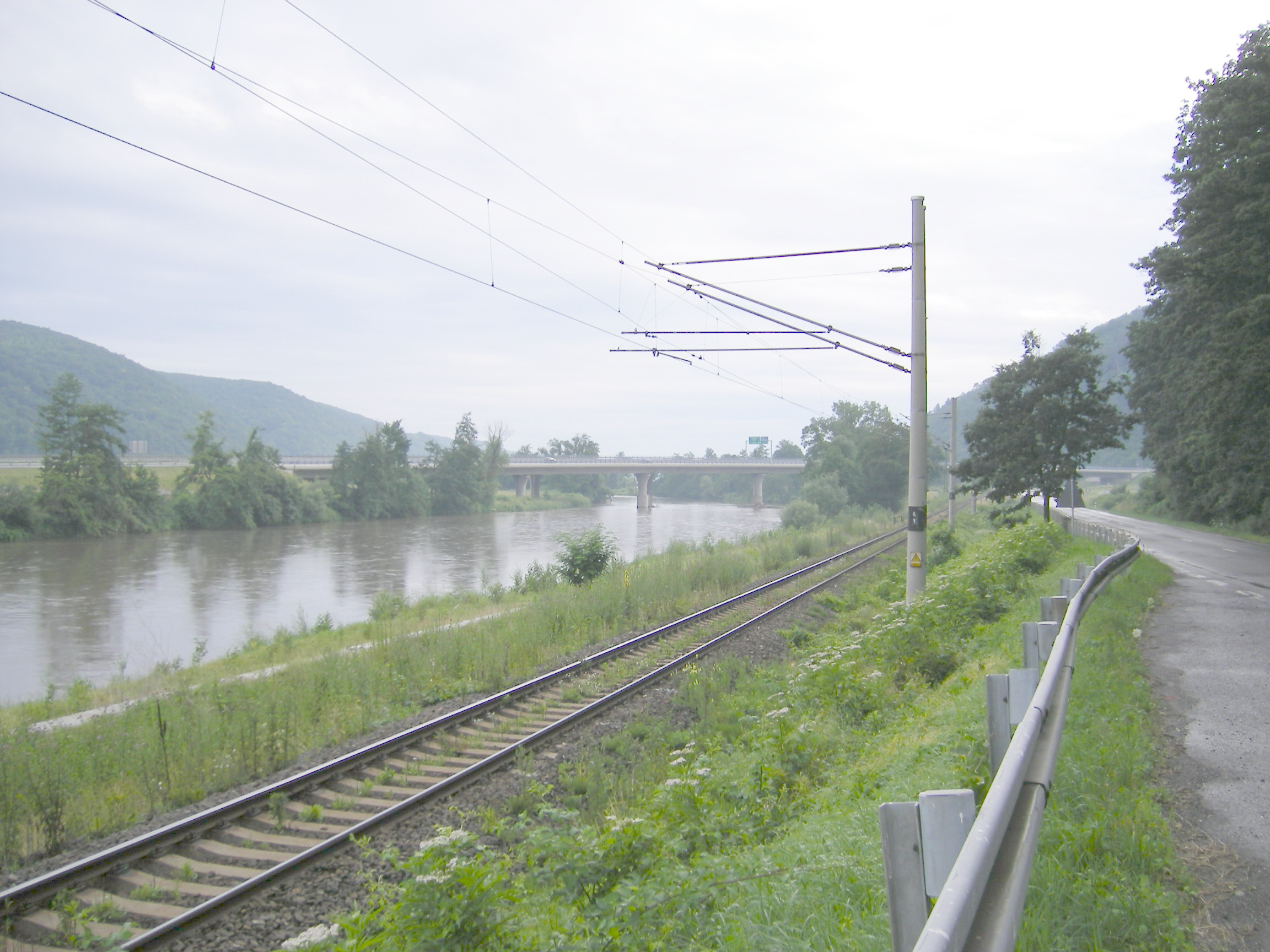 River Hron in Hronský Beňadík (okres Žarnovica)